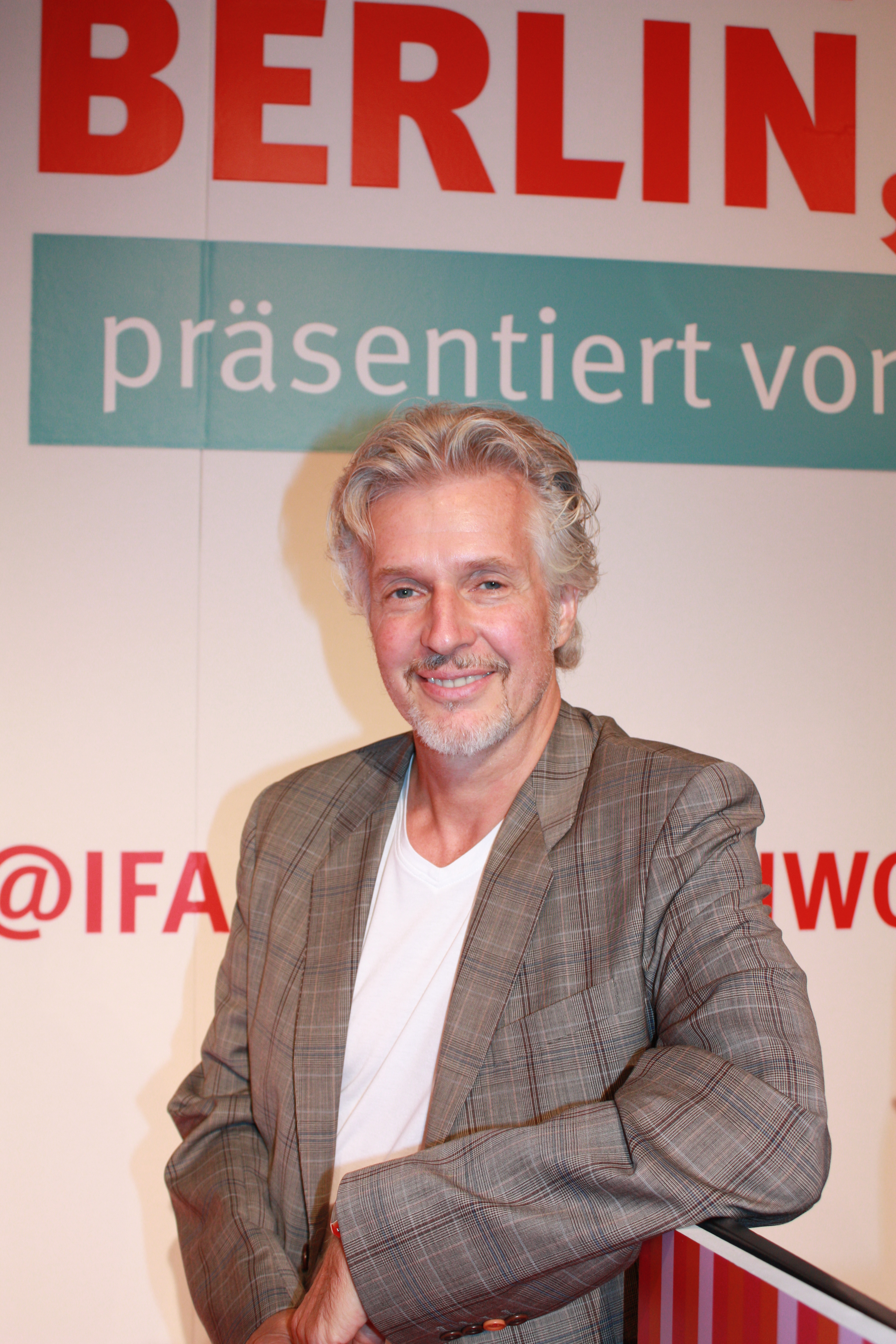 Internationaler Medienkongress im Rahmen der Internationale Funkausstellung 2012, Frank Schätzing